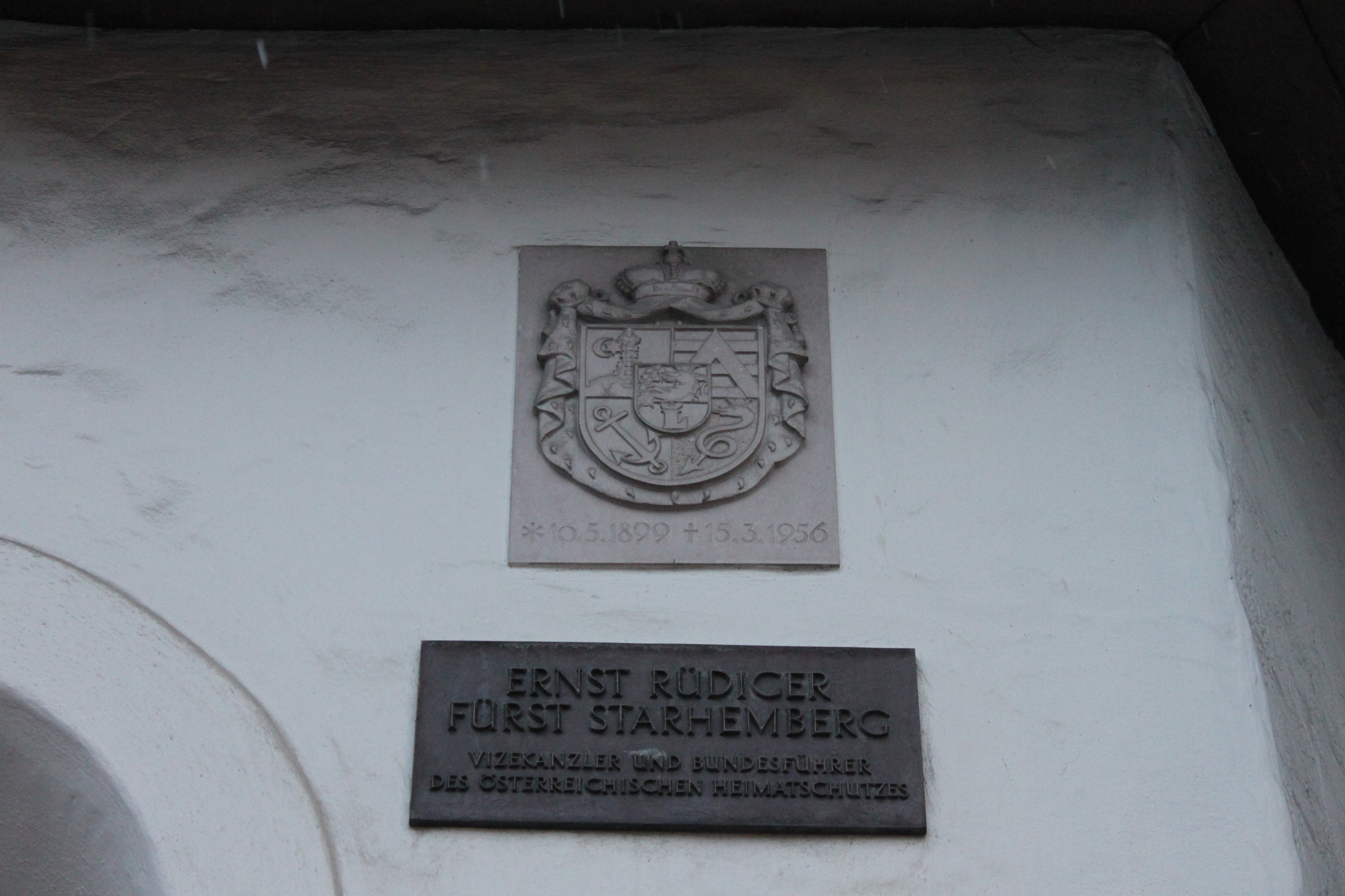 Litzkapelle, in Schruns, Aussenmauer unter dem Vordach, Gedenkstein mit dem Wappen der Starhemberg und Gedenktafel zu Ernst Rüdiger Starhemberg (1899-1956), ebenhier bei der Kapelle verstorben